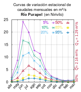 Curva de Variación Estacional Río Purapel en Nirivilo. # cita publicación # | apellido = Dirección General de Aguas # | nombre = # | enlace-autor = Ministerio de Obras Públicas (Chile) # | título = Diagnóstico y clasificación de los cursos y cuerpos de agua según objetivos de calidad. Cuenca del río Maule # | ubicación = Santiago de Chile # | editorial = Ministerio de Obras Públicas (Chile) # | año = 2004 # | edición = # | url = # | ref = harv # Tabla 4.9: Río Purapel en Nirivilo (m3/s) pág. 57 mes 5% 10% 20% 50% 85% 95% abr 1.914 1.357 0.895 0.404 0.151 0.085 may 8.764 6.004 3.797 1.582 0.538 0.286 jun 24.244 16.669 10.589 4.449 1.529 0.816 jul 19.941 15.771 11.790 6.554 2.845 1.523 ago 12.630 10.618 8.472 5.195 2.498 1.493 sep 11.405 8.833 6.481 3.587 1.731 1.128 oct 5.219 4.166 3.171 1.882 0.990 0.679 nov 2.410 2.026 1.618 0.999 0.497 0.314 dic 1.456 1.216 0.961 0.569 0.246 0.124 ene 0.745 0.624 0.497 0.306 0.137 0.060 feb 0.710 0.550 0.388 0.173 0.043 0.015 mar 0.827 0.669 0.505 0.268 0.095 0.041 This plot was created with Gnuplot.